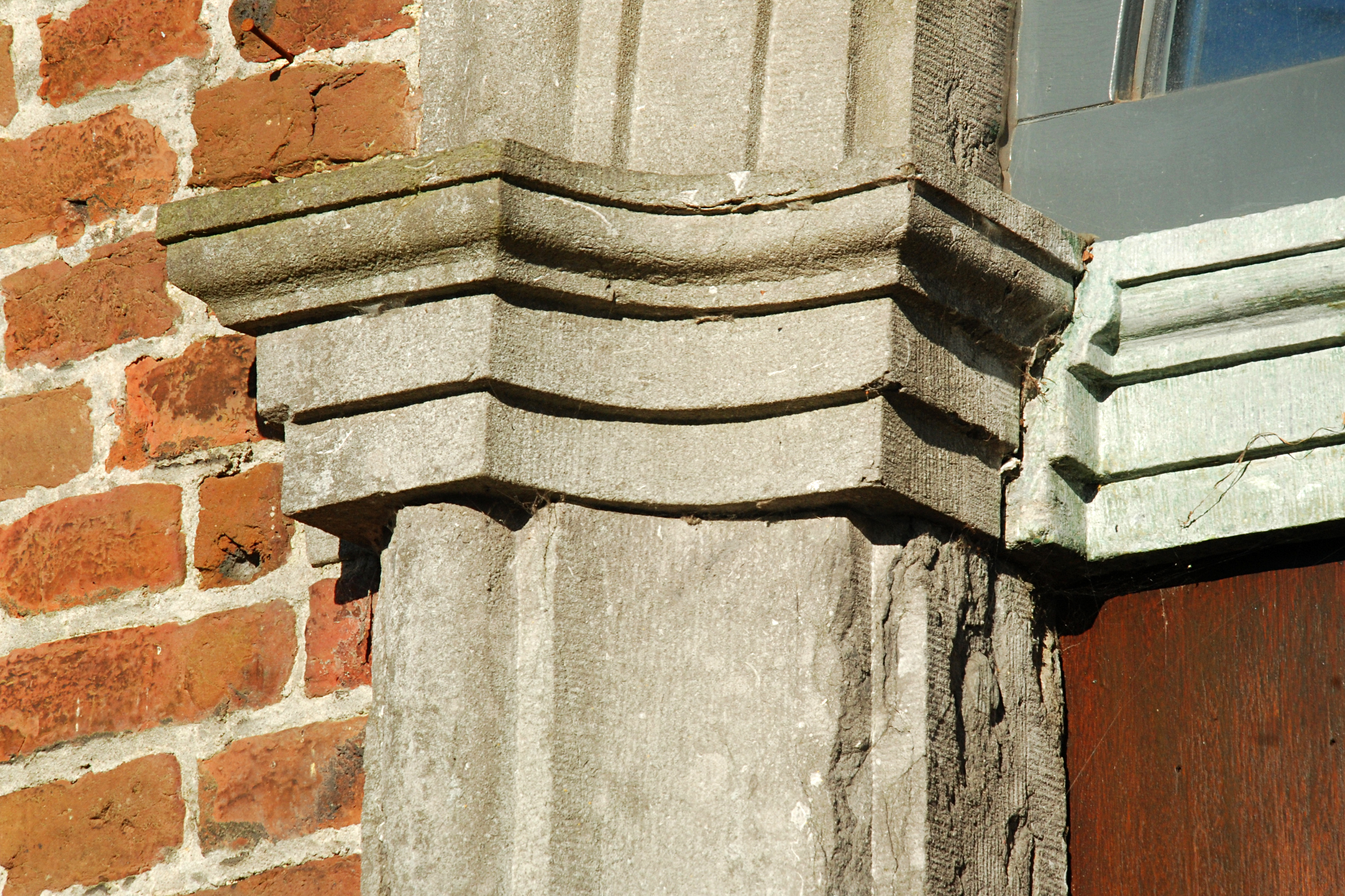 Belgique - Brabant wallon - Chastre - Église Sainte-Gertrude de Gentinnes